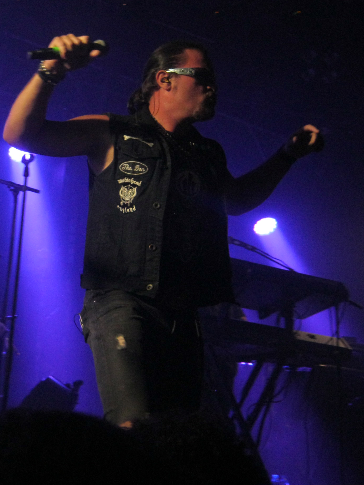 Russell Allen with Symphony X at Israel. 10/08/16